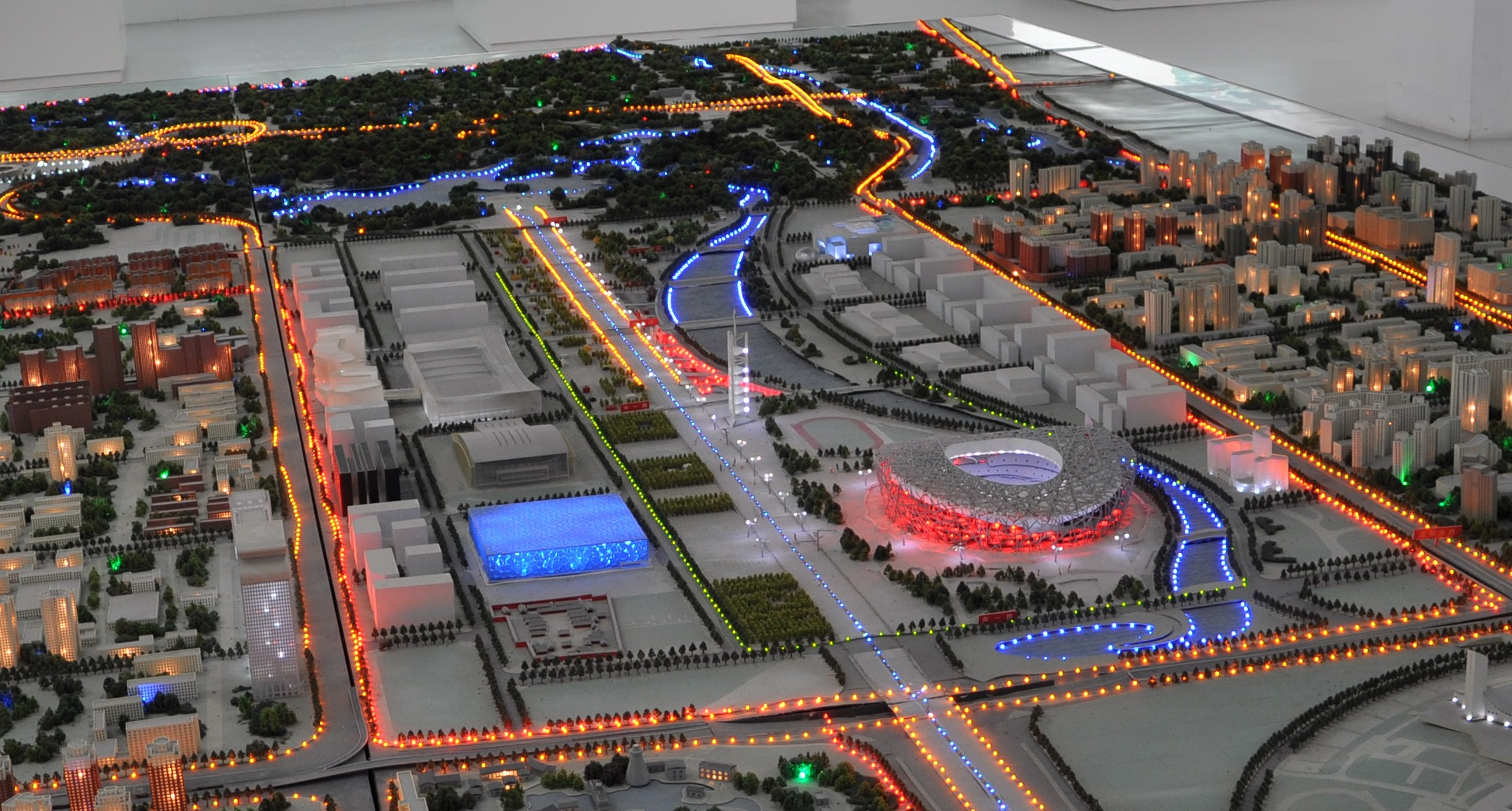 北京奥林匹克公园核心区的沙盘。可以看到主要的建筑物。摄于下沉花园1号院内的奥运规划馆。